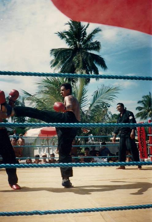 Competição de Full-Contact realizado pela Federação de Kickboxing Full-Contact do Estado da Paraíba.